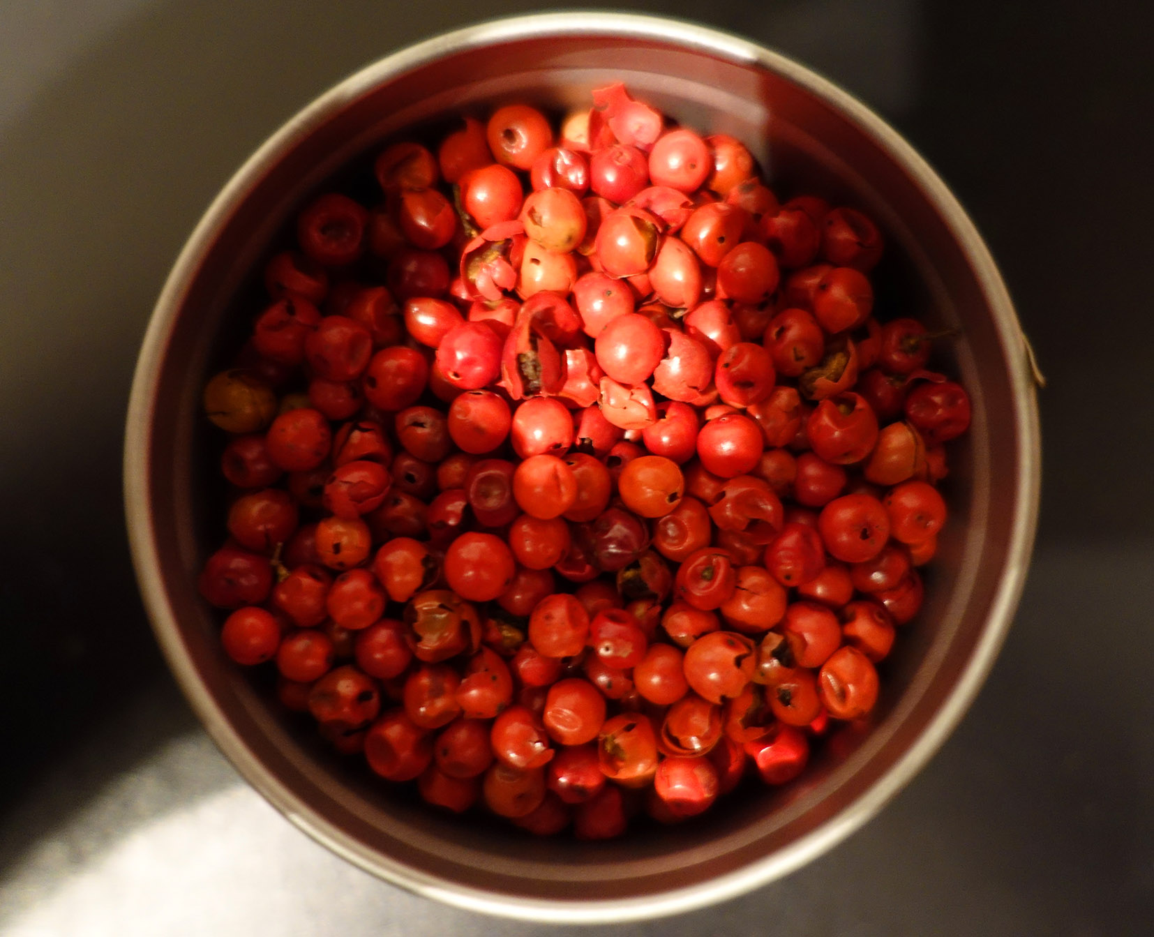 Getrocknete Beeren